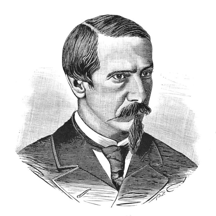 Portrait de Julio Arboleda paru dans le périodique colombien "Papel Periódico Ilustrado" (1881-1887)